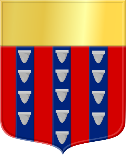 Waardenburg gemeentewapen 1816 HRvA